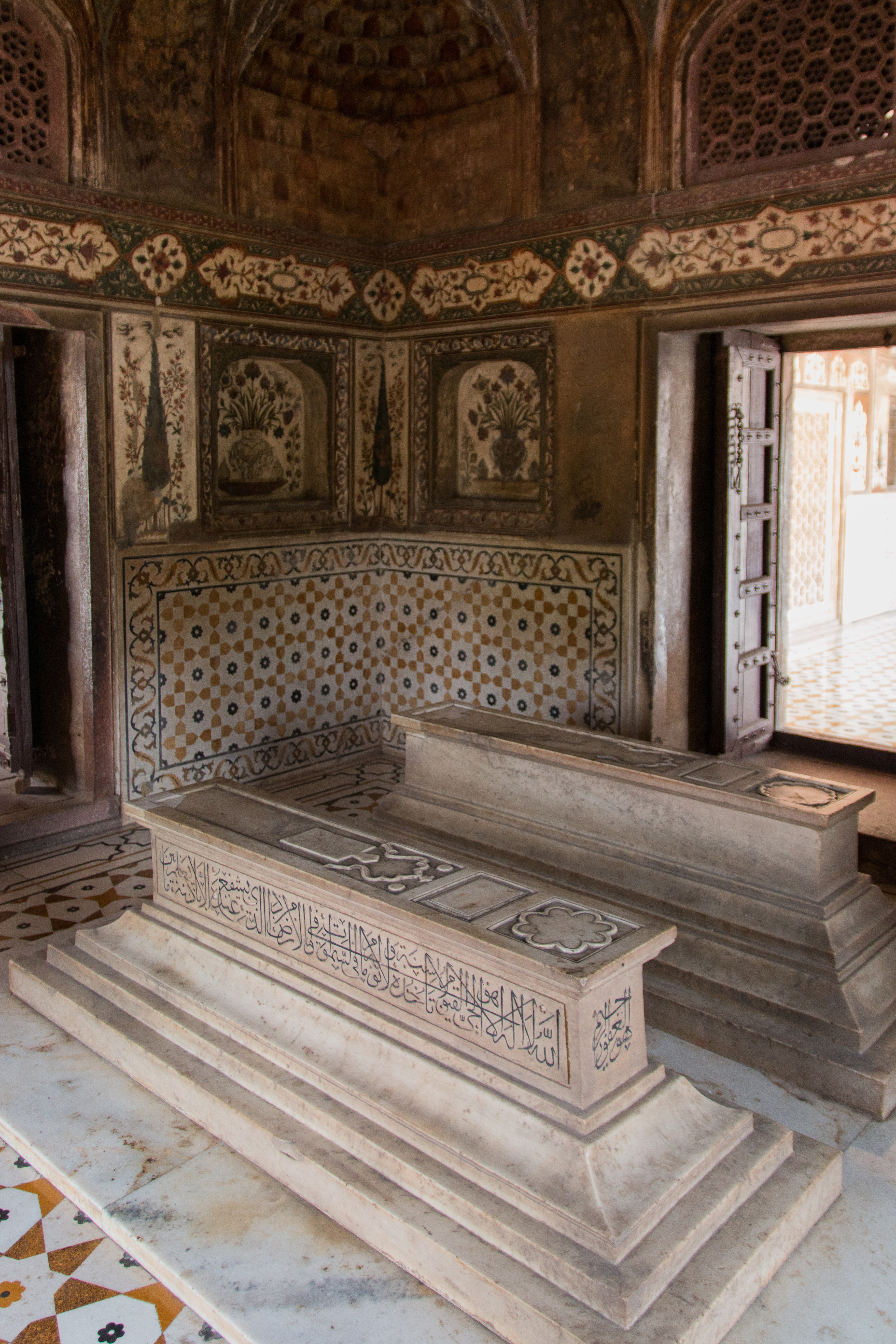 Itmad ud Daulah mausoleum.